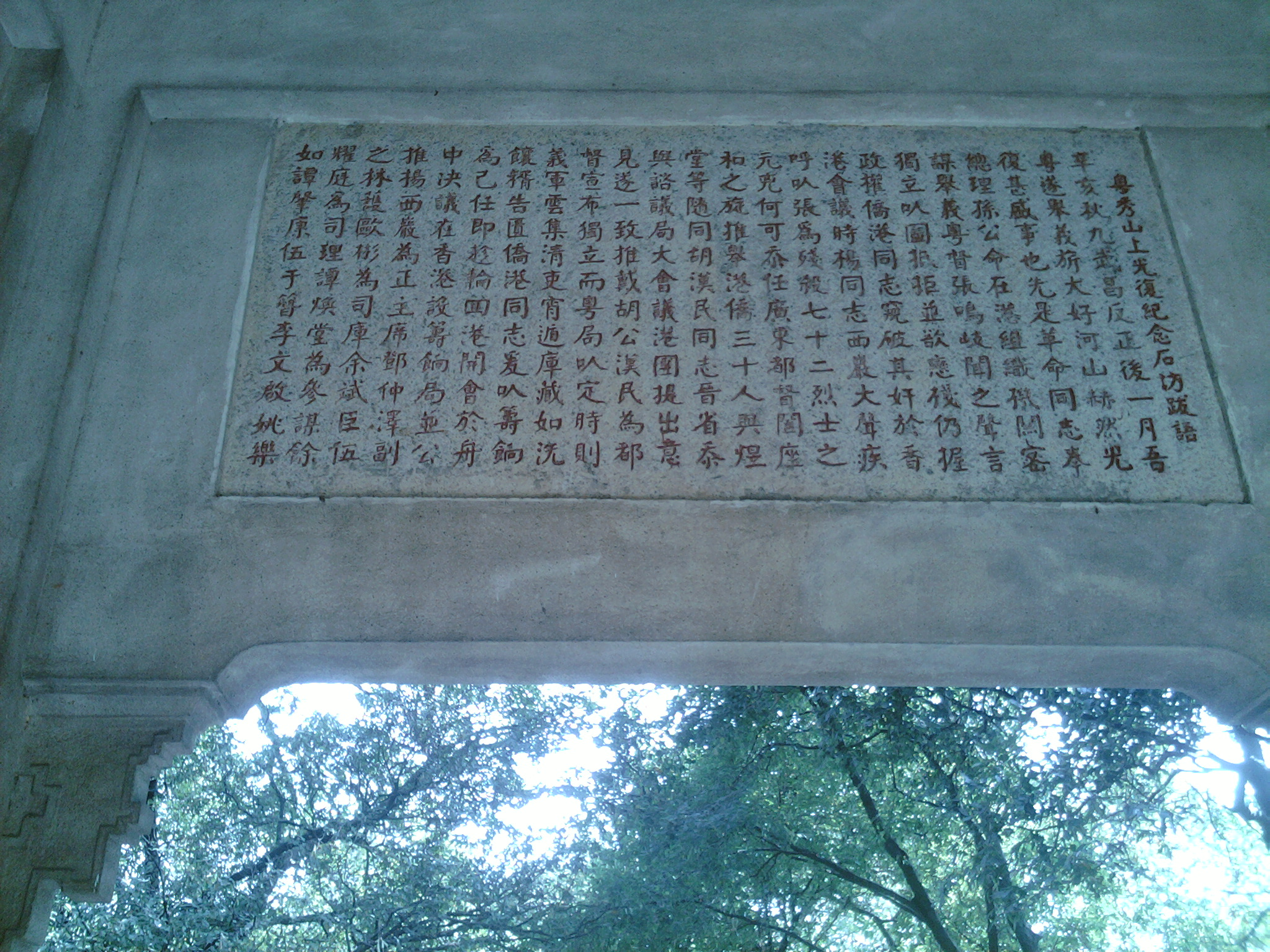 粵秀山上光復紀念石坊跋語 辛亥秋九武昌反正後一月吾粵遂舉義旂（旗），大好河山赫然光復甚盛世也。先是革命同志奉總理孫公命在港組織機闗（關）密謀舉義，粵督張鳴歧聞之聲言獨立㕥（以）圖抵拒，並𣣔（慾）戀棧仍握政權。僑港同志窥（窺）破其奸，於香港會議時楊同志西巖大聲疾呼：㕥（以）張爲殘殺七十二烈士之元𠒋（兇），何可忝任廣東都督。闔座和之。旋推舉港僑三十人與煜堂等隨同胡漢民同志晉省忝與諮議局大會議。港團提出意見，遂一致推戴胡公漢民為都督，宣布獨立。而粵局㕥（已）定時，則義軍雲集，清吏宵遁，庫藏如洗，饟稰告匱。僑港同志爰㕥（以）籌餉爲己任，即趁輪囬（回）港開會於舟中決議在香港設籌餉局，並公推楊西巖為正主席，鄧仲澤副之，林護、歐彬為司庫，余斌臣、伍耀庭爲司理，譚煥堂為參謀，餘如譚肇康、伍于簪、李文啟、姚樂臣、朱伯元、鄭幹生、吳東啟、胡鼎男、伍學熀、黃汪波、張兆蘭、譚亦僑、李幹廷、吳性初、朱佐中、譚教五、馮昌璉、黎榮洛、馮兆堃、麥性湖、冼志等皆局員也。即席籌議募捐方法，楊西巖則慨然曰，請自隗始。因而同聲相應，不半日已集得現金四十八萬餘元，登即僱港輪河南號運省繳庫。不逾月續籌得二百萬元先後解交省庫備用，于（於）是津滬各報宣傳殆徧（遍）。清廷㕥（以）民意所趨，大局已去，始有南北議和之舉。及南北統一，又解中央協欵（款）八十萬元。在負責籌捐者祇（只）求盡國民之義務，不知其他。而港僑之踊躍輸將已成鉅萬。除首次籌欵（款）四十八萬餘元已奉政府償還外，餘不過問，亦不受酬，誠足多也。今日者吾國統一實現固足㕥（以）慰。總理在天之靈亦可㕥（以）副港僑當日之望也。請諸政府得許建坊，爰贅數言永留紀念。 中華民國十七年十一月 日前廣東財政司司長李煜堂謹識